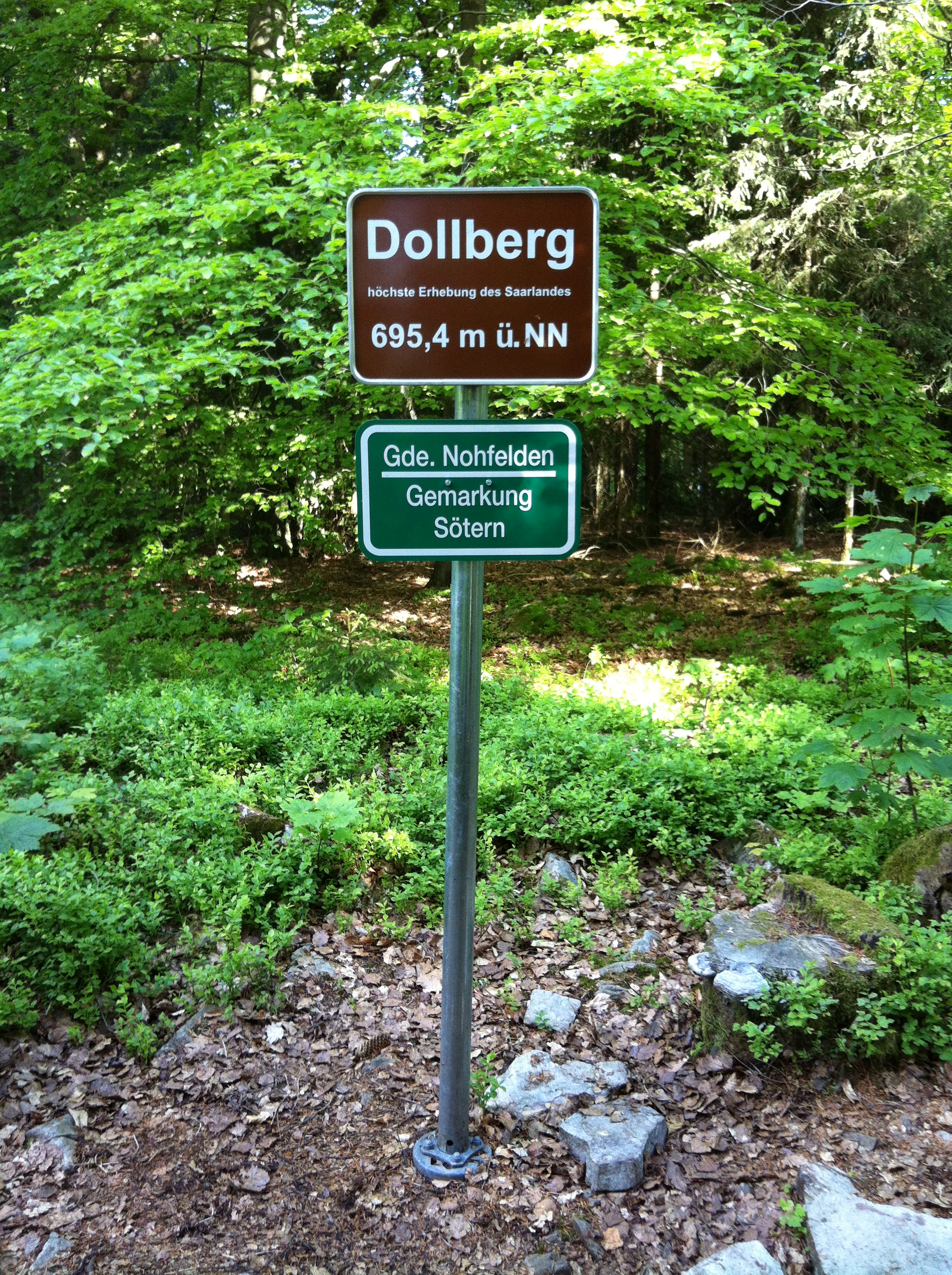 Hinweisschild am geografisch höchsten Punkt des Saarlandes, Dollberg